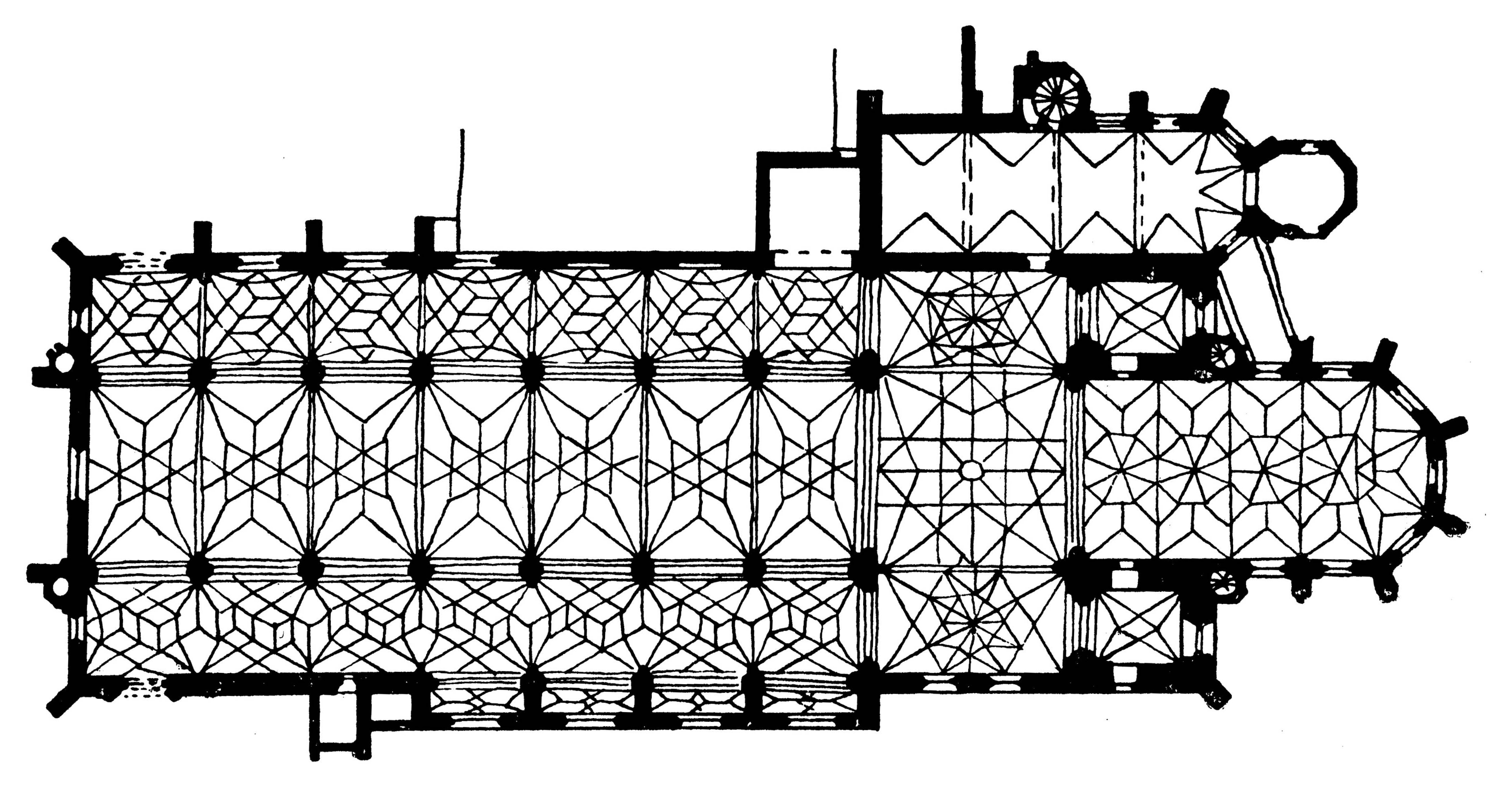 Grundriss Augsburg Ehem. Benediktiner-Reichsstift St. Ulrich und Afra